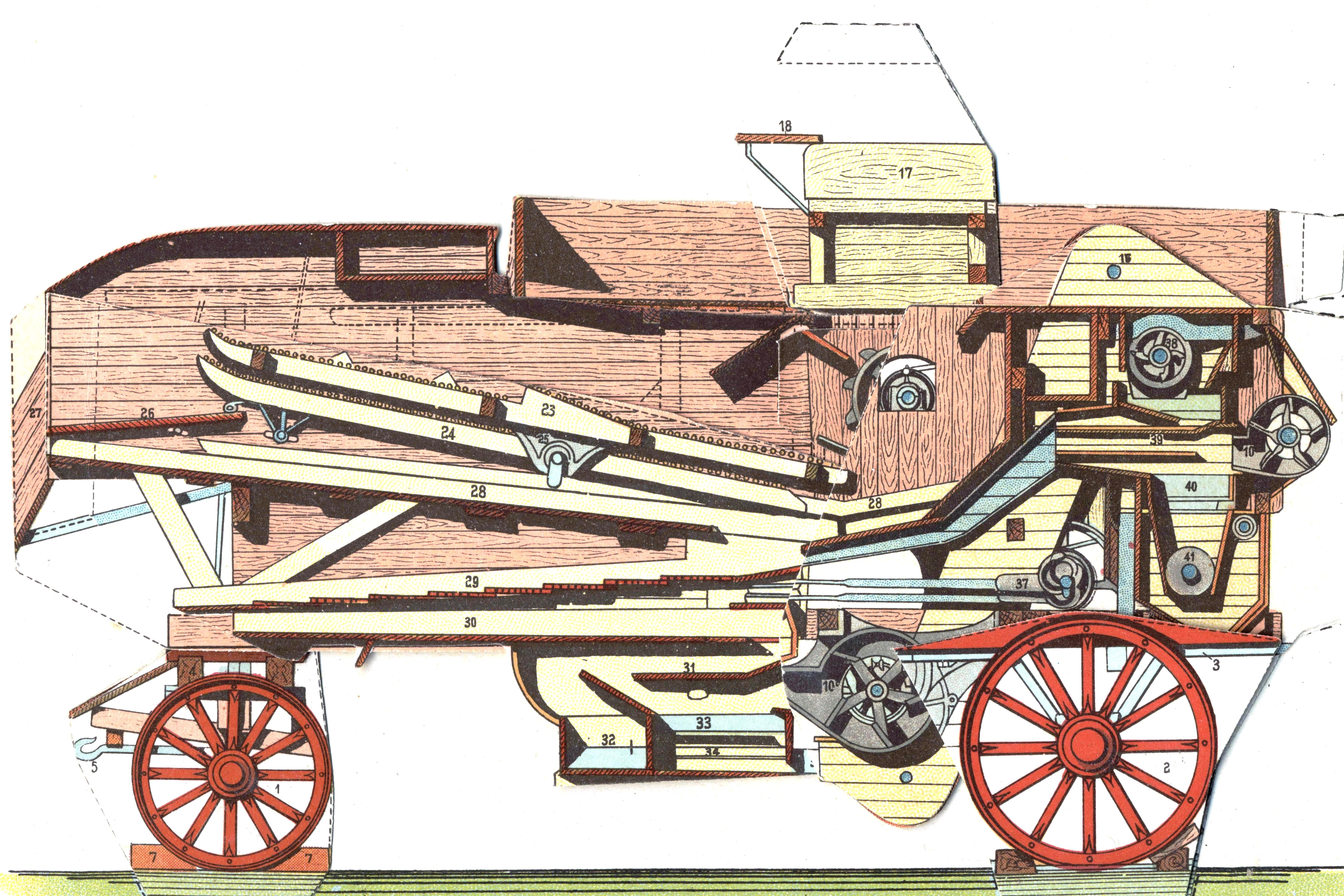 Dreschmaschinn Plang 2 Quell: Scan vum Les Meloures aus der Grande Ecyclopédie Pratique vun 1913